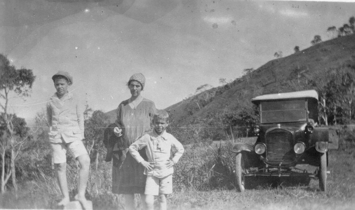 Oude foto uit eigen familiealbum